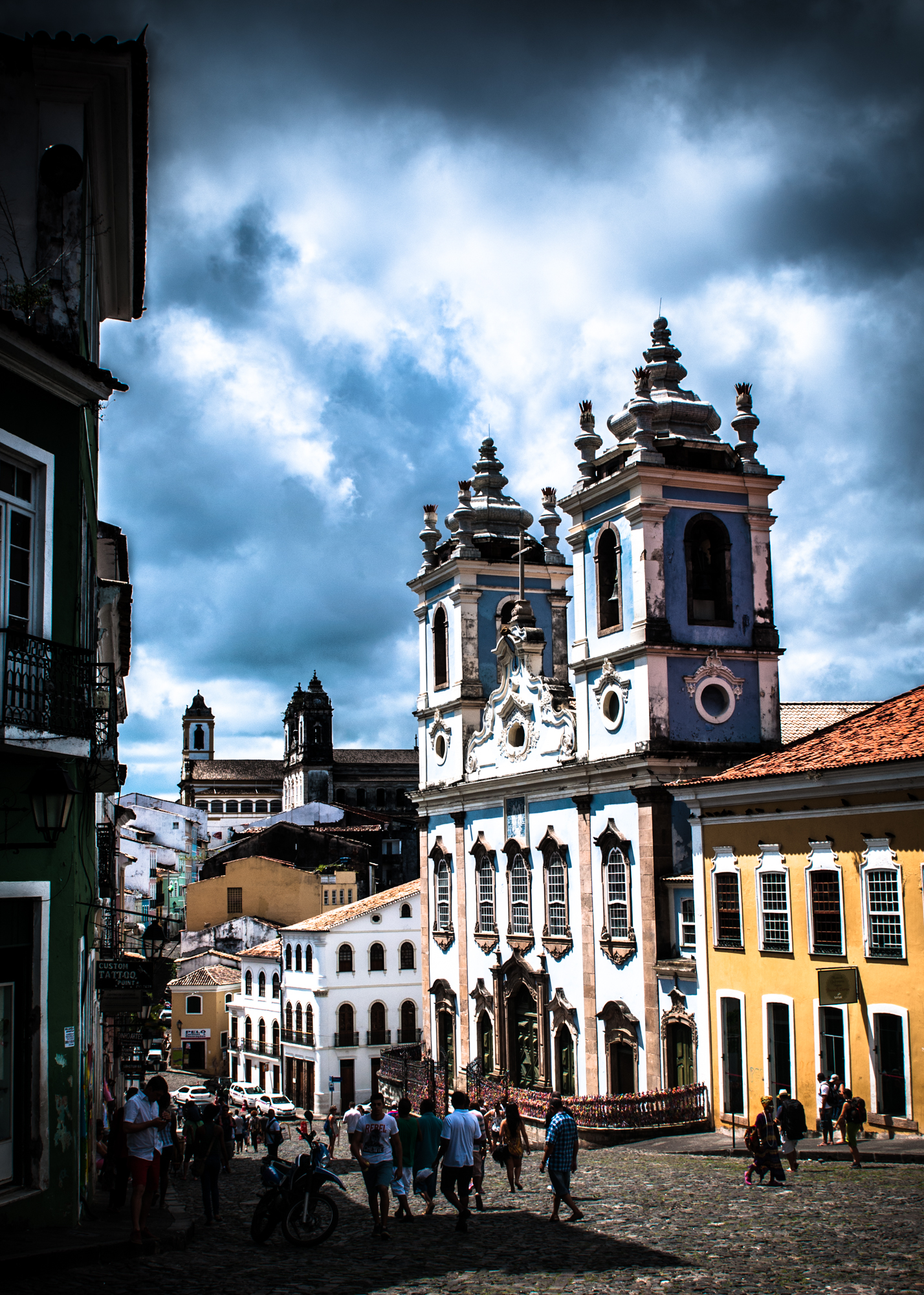 Igreja do Rosário dos Pretos